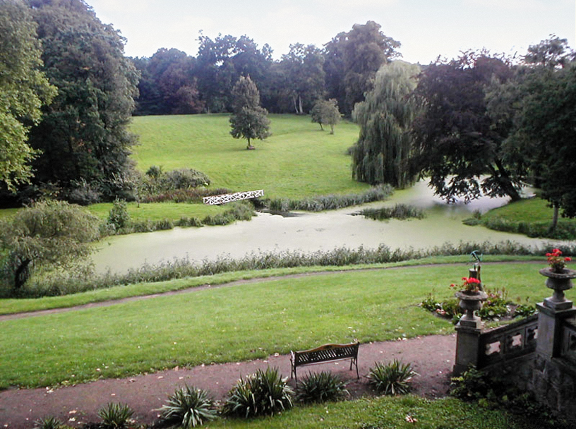 Schlosspark in Kittendorf, Mecklenburg-Vorpommern, Deutschland